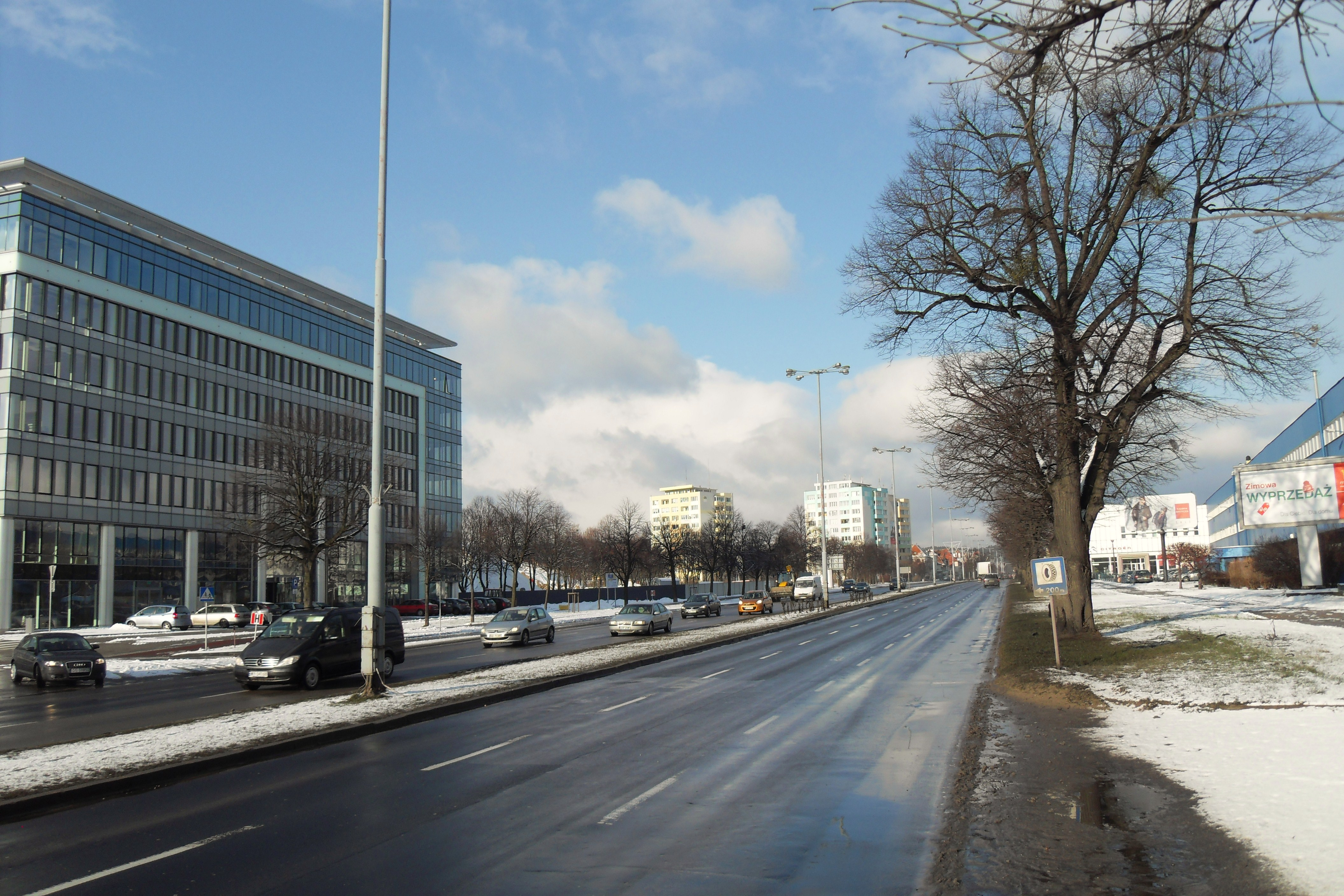 Gdańsk Oliwa, al. Grunwaldzka.